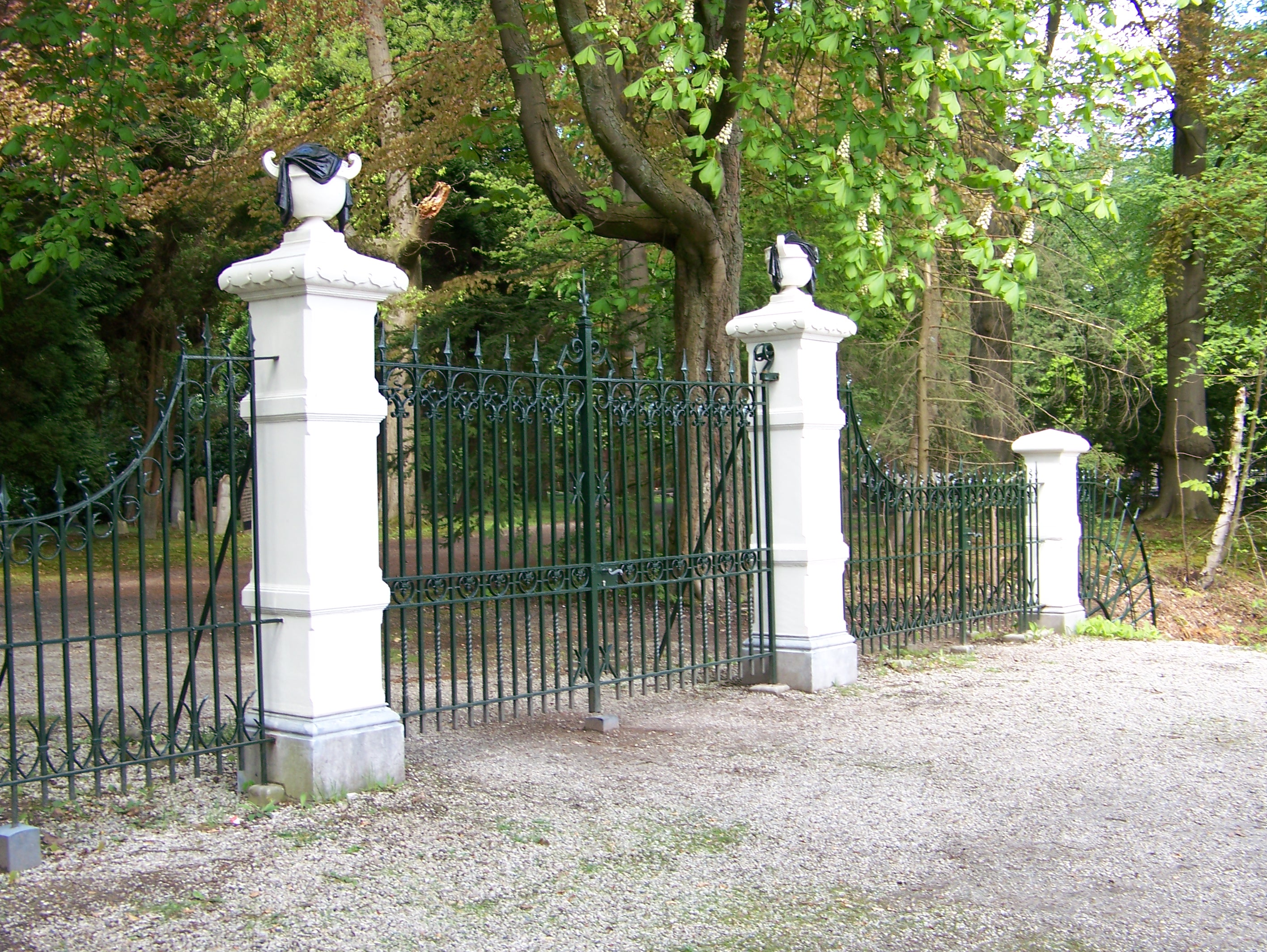 Toegangshek Zuiderbegraafplaats in Assen, is een Rijksmonument.